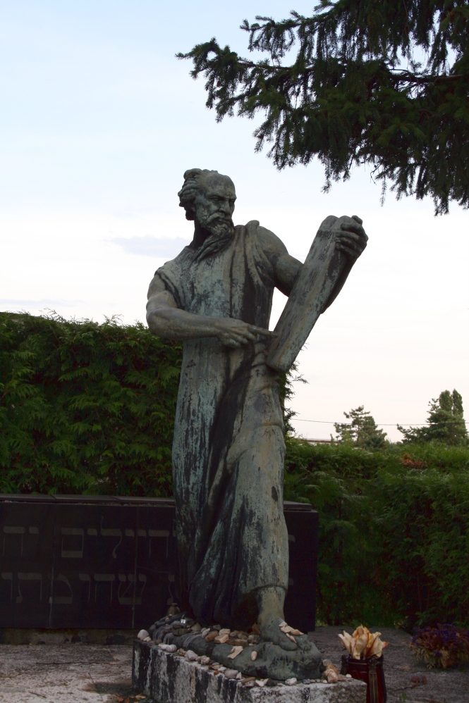 Spomenik Mojsije Antuna Augustinčića na Mirogoju